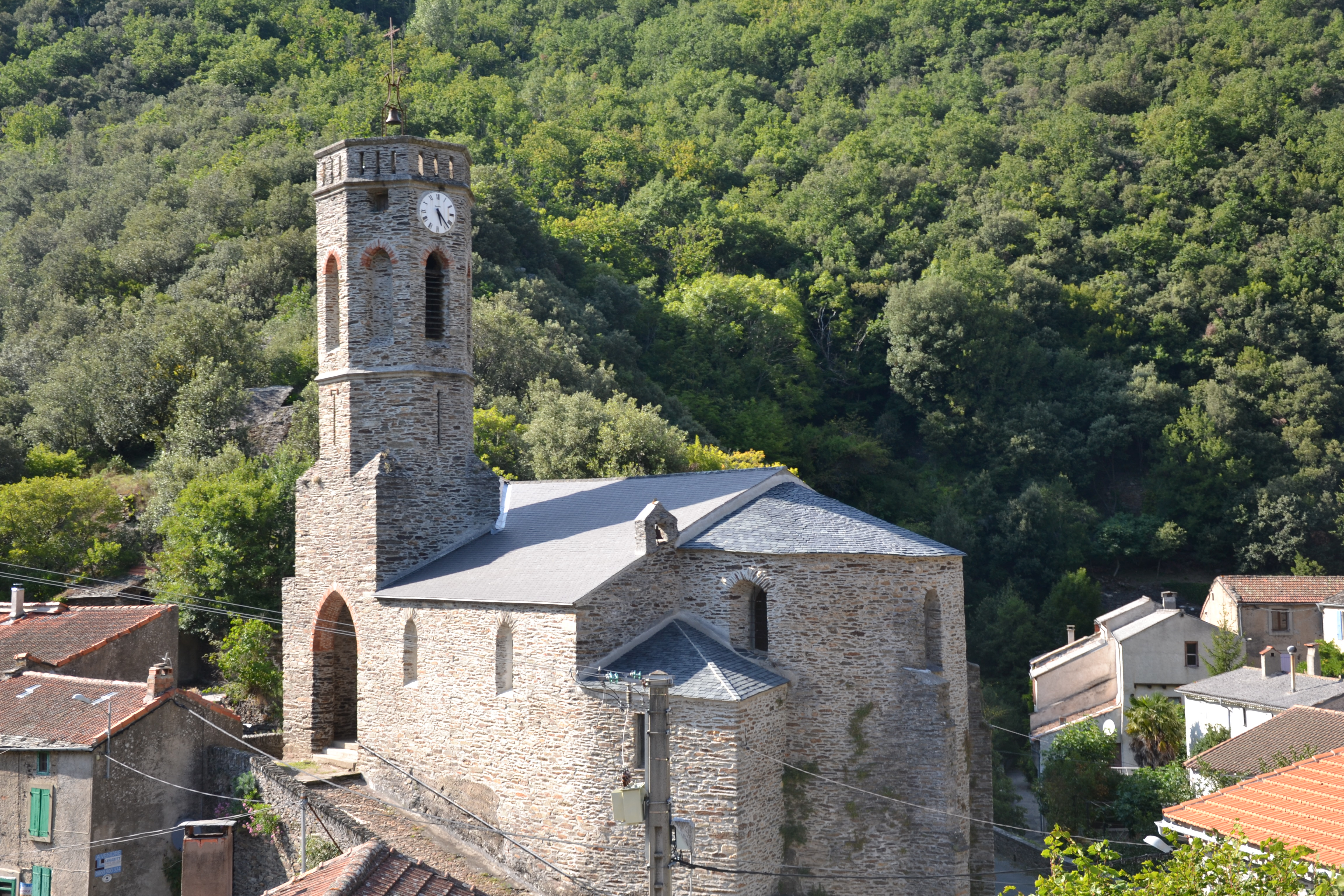 Eglise paroissiale